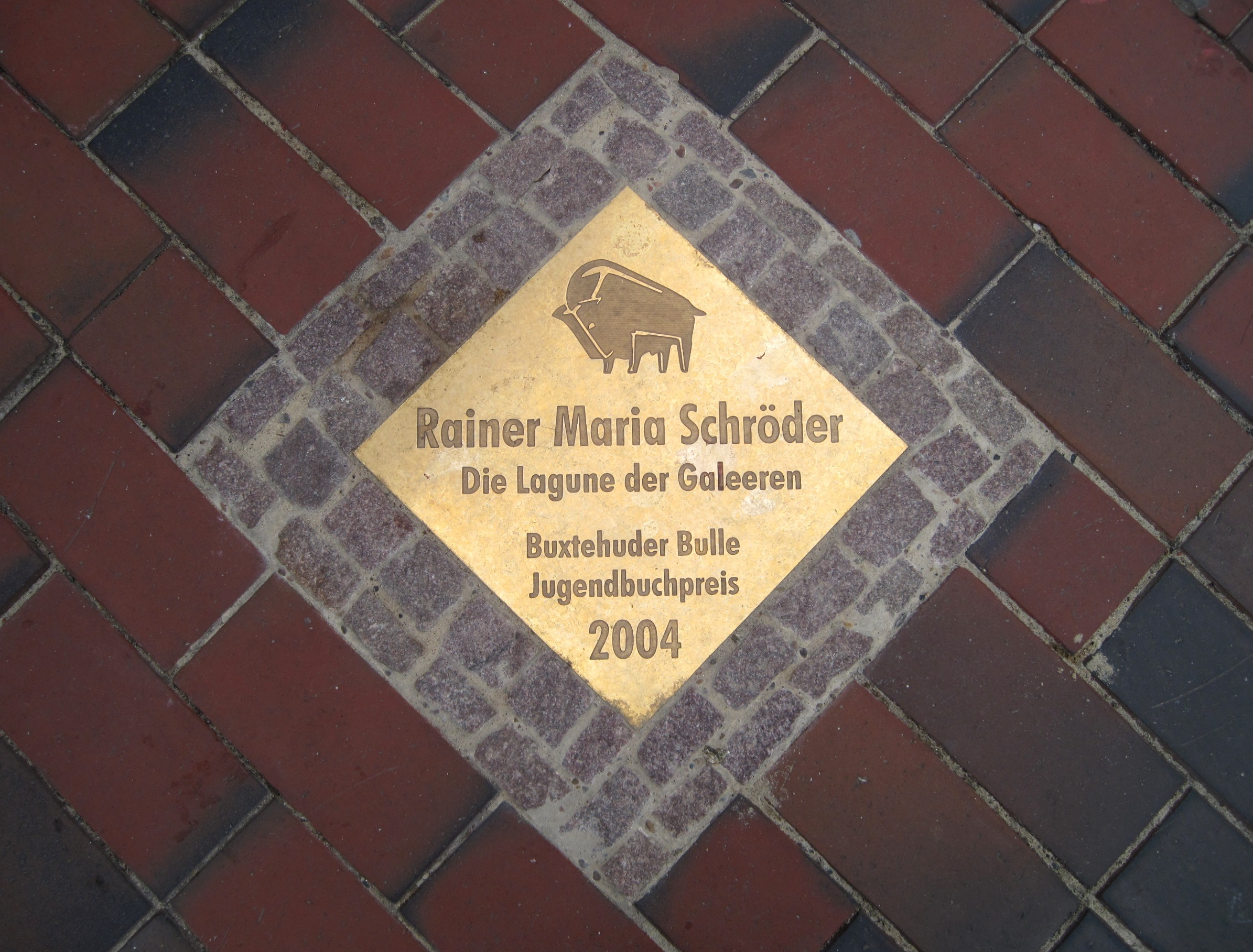 Messingplatte in der Buxtehuder Bahnhofstraße für den Preisträger 2004 des Buxtehuder Bullen, Rainer Maria Schröder.